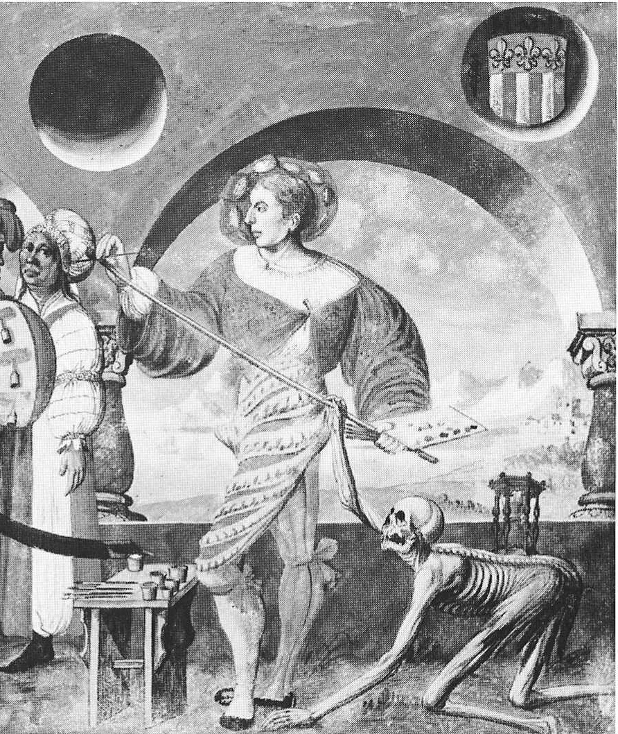 Niklaus Manuels Selbstbildnis am Schluss seines Totentanzes (Ausschnitt).